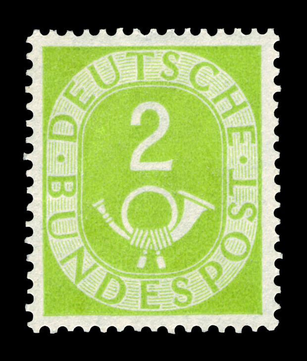 Stamp description / Briefmarkenbeschreibung Posthorn-Serie Ausgabepreis: 2 Pfennig First Day of Issue / Erstausgabetag: 1. August 1951 Michel-Katalog-Nr: 123